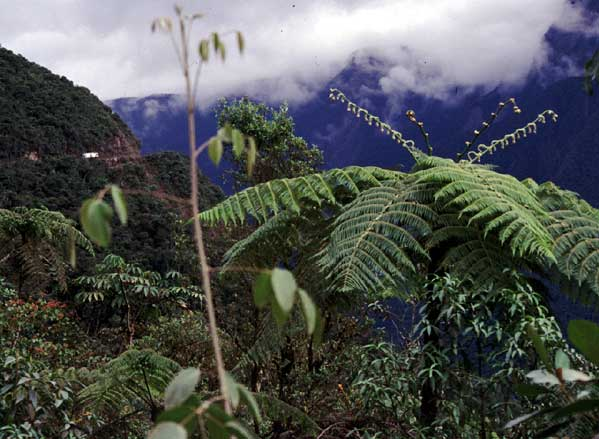 Strecke in die Yungas/Bolivien: tropischer Bergwald (2500 m ü.NN)